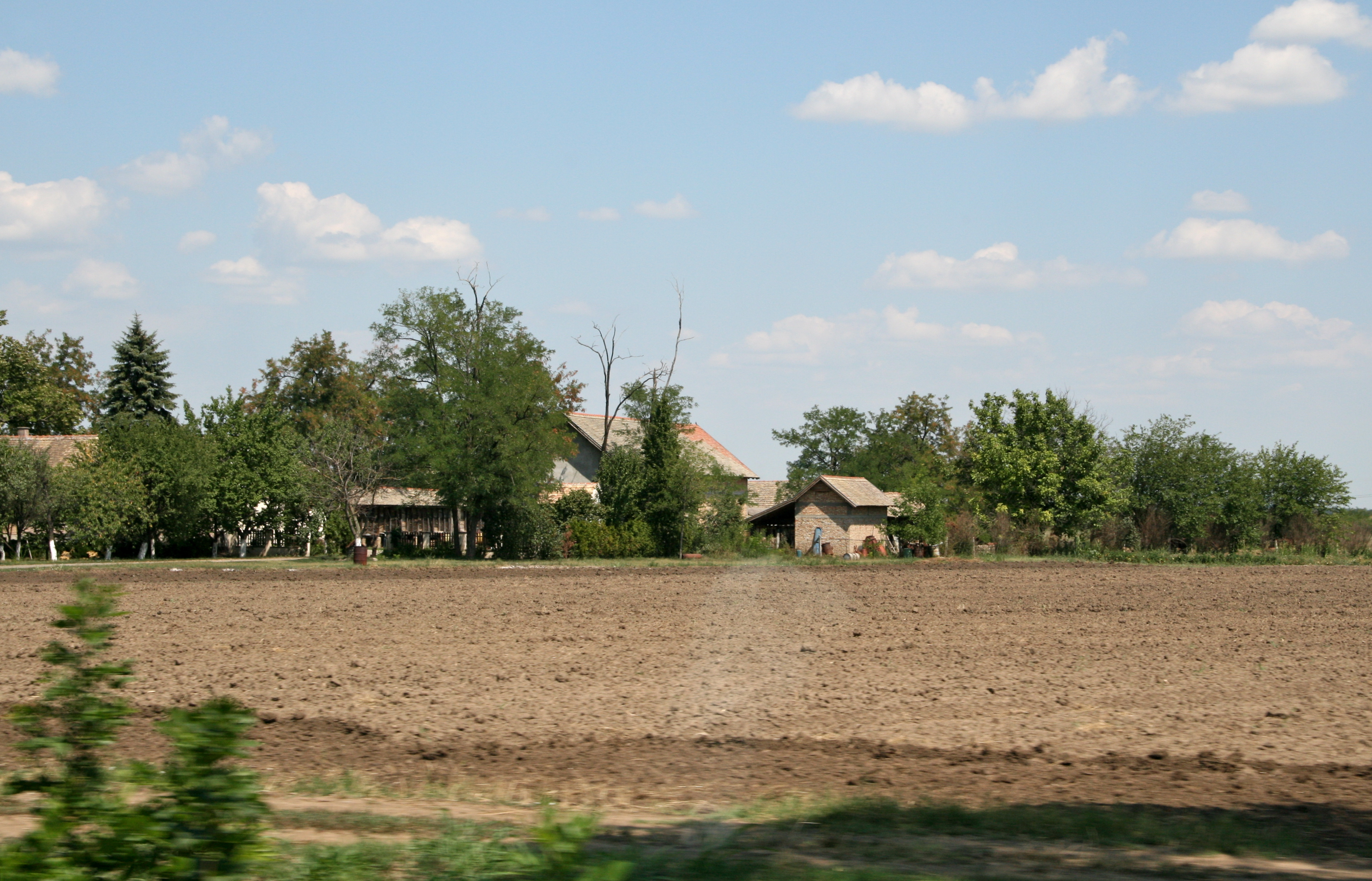 Плодна земља - Ченеј